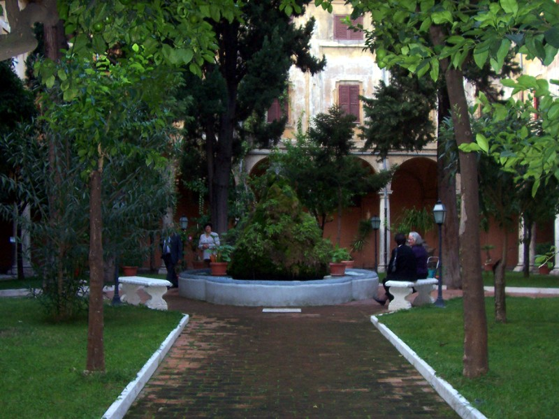 Roma - Chiostro della Chiesa di S. Andrea delle Fratte